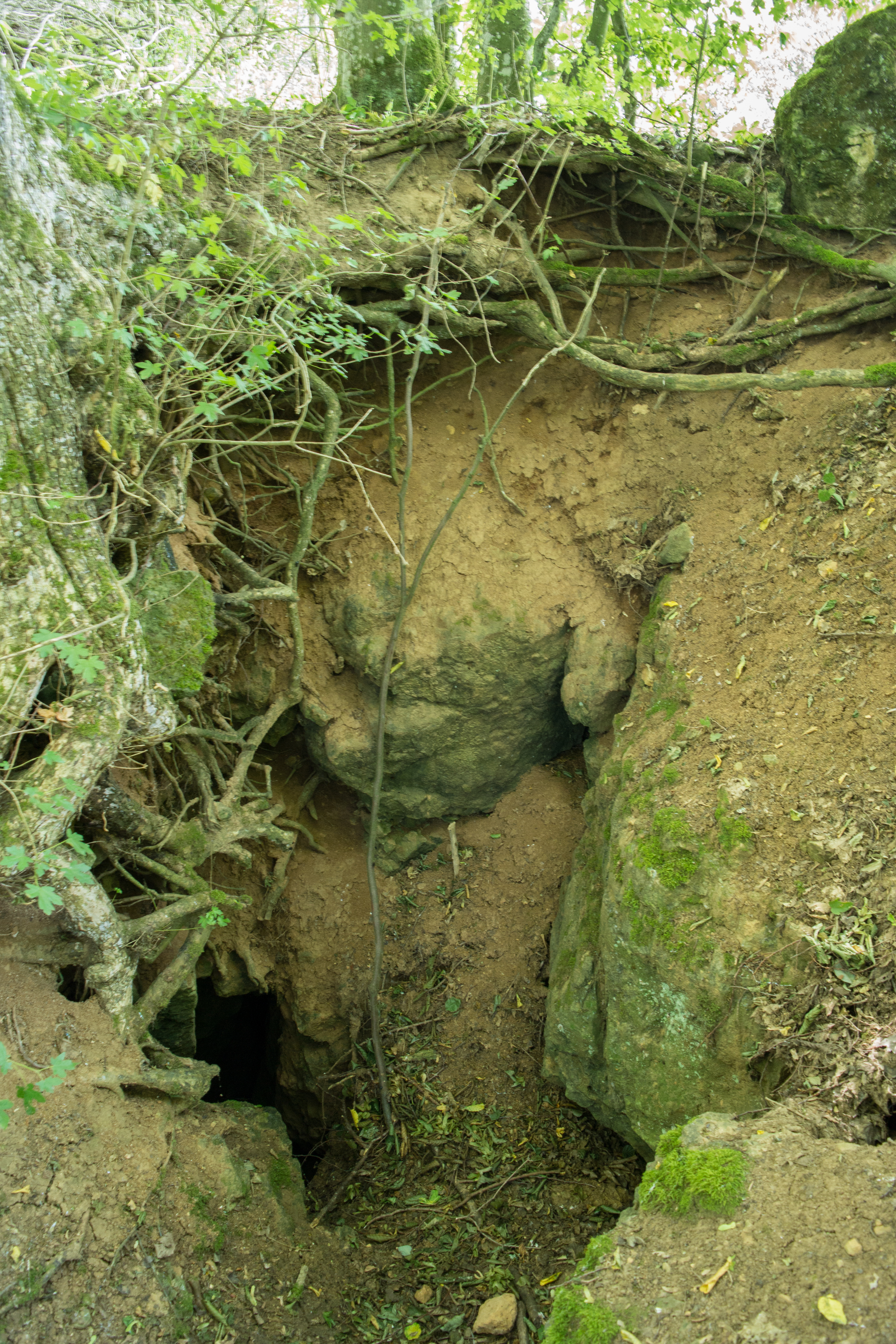 Schluckloch (Höhleneingang)